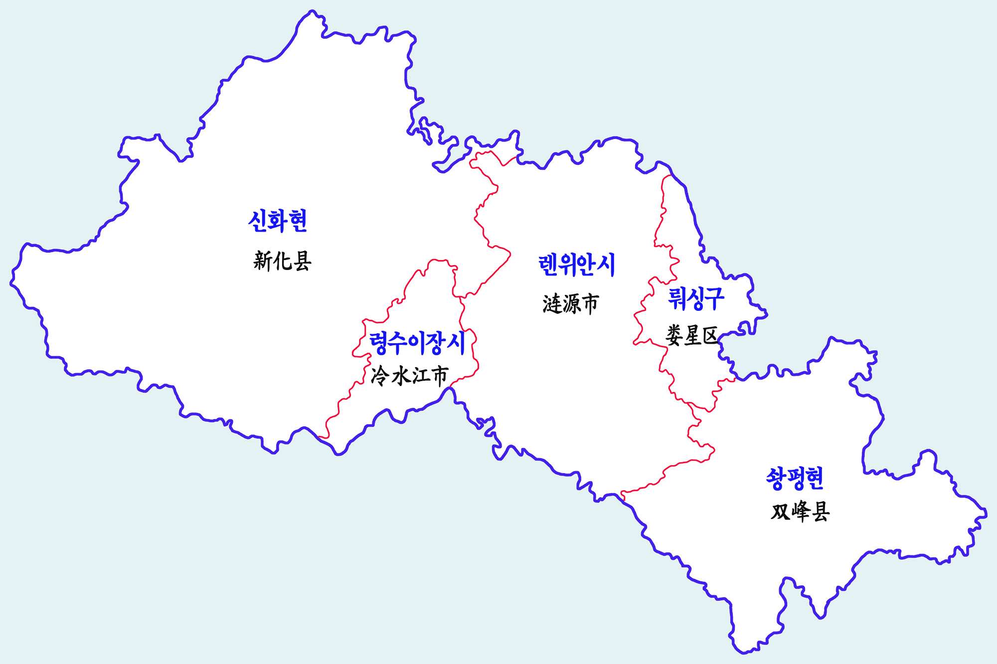 뤄디시 현급행정구역